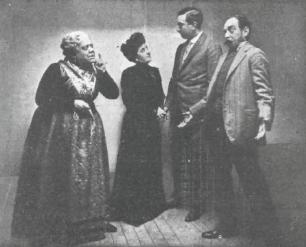 Escena de la representación de la obra de teatro Doña Clarines, de los Hermanos Álvarez Quintero, en 1909